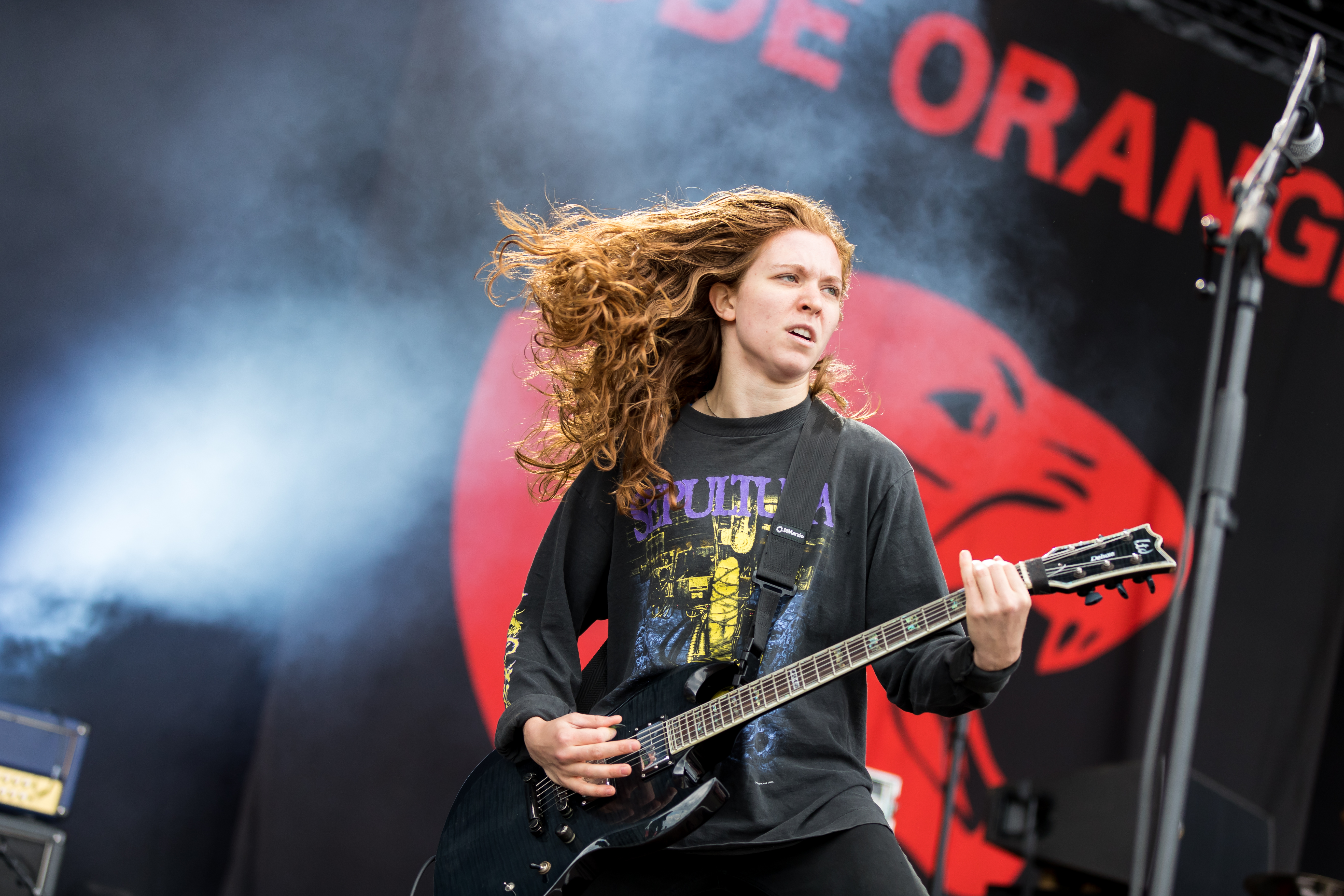 Code Orange during Rock am Ring at Nürburgring, Nürburg, Rheinland Pfalz, Germany on 2017-06-04, Photo: Sven Mandel